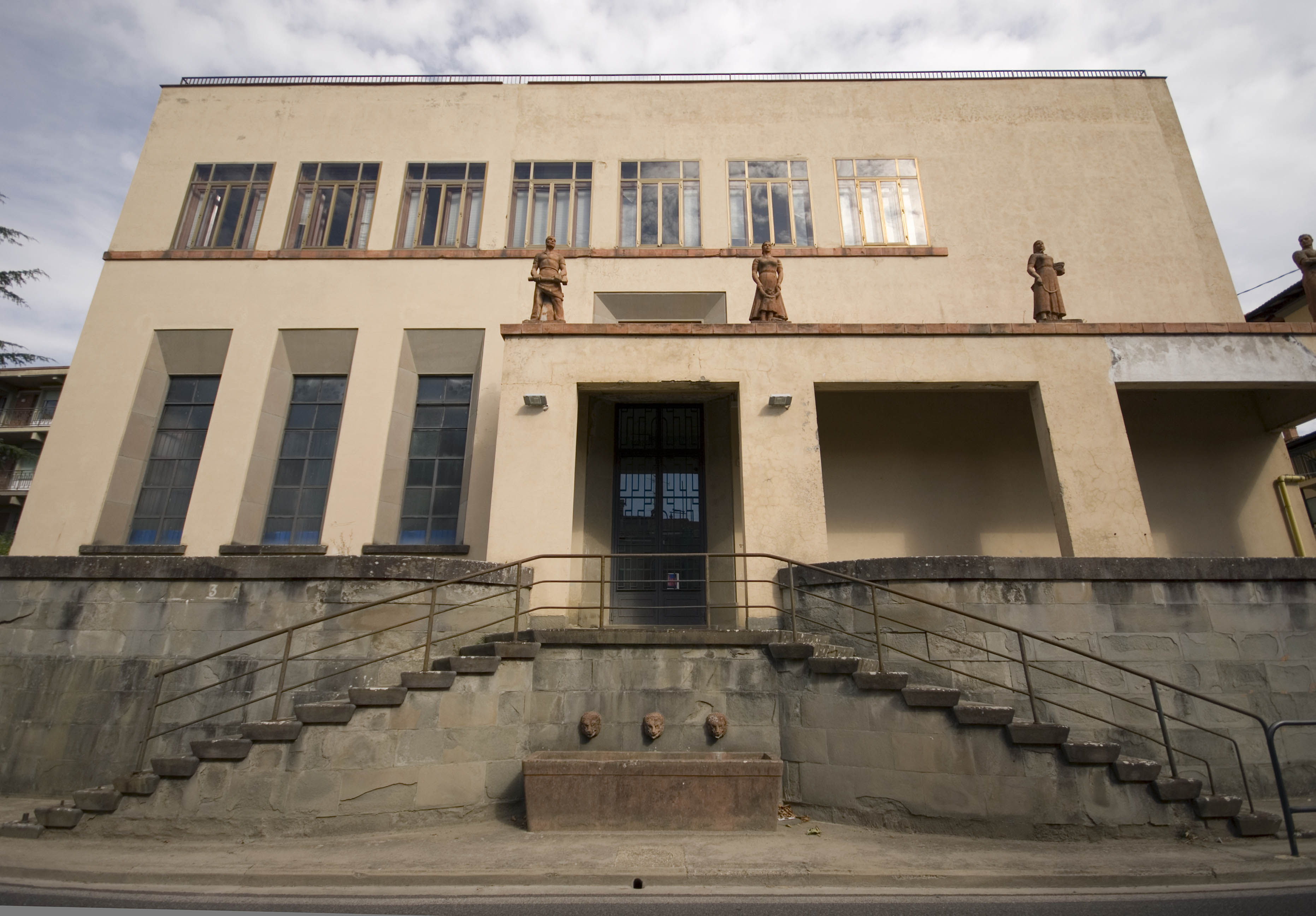 Facciata della scuola elementare di Impruneta